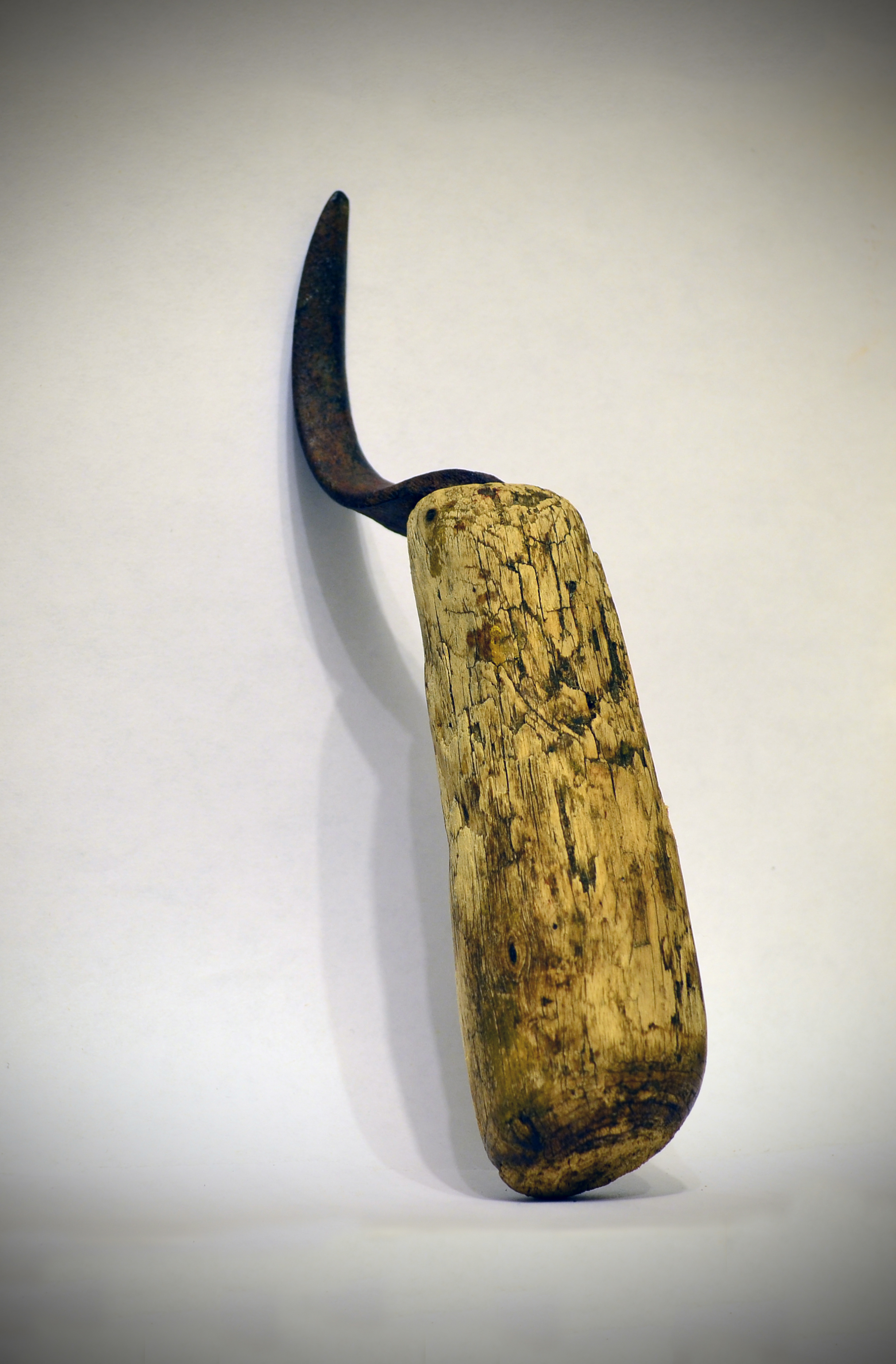 Кочедык для плетения лаптей.Россия,19 век.